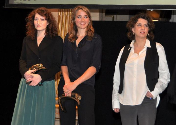 Les actrices du film L'Apollonide (Alice Barnole, Adèle Haenel, Noémie Lvovsky) à la cérémonie des Prix Lumières